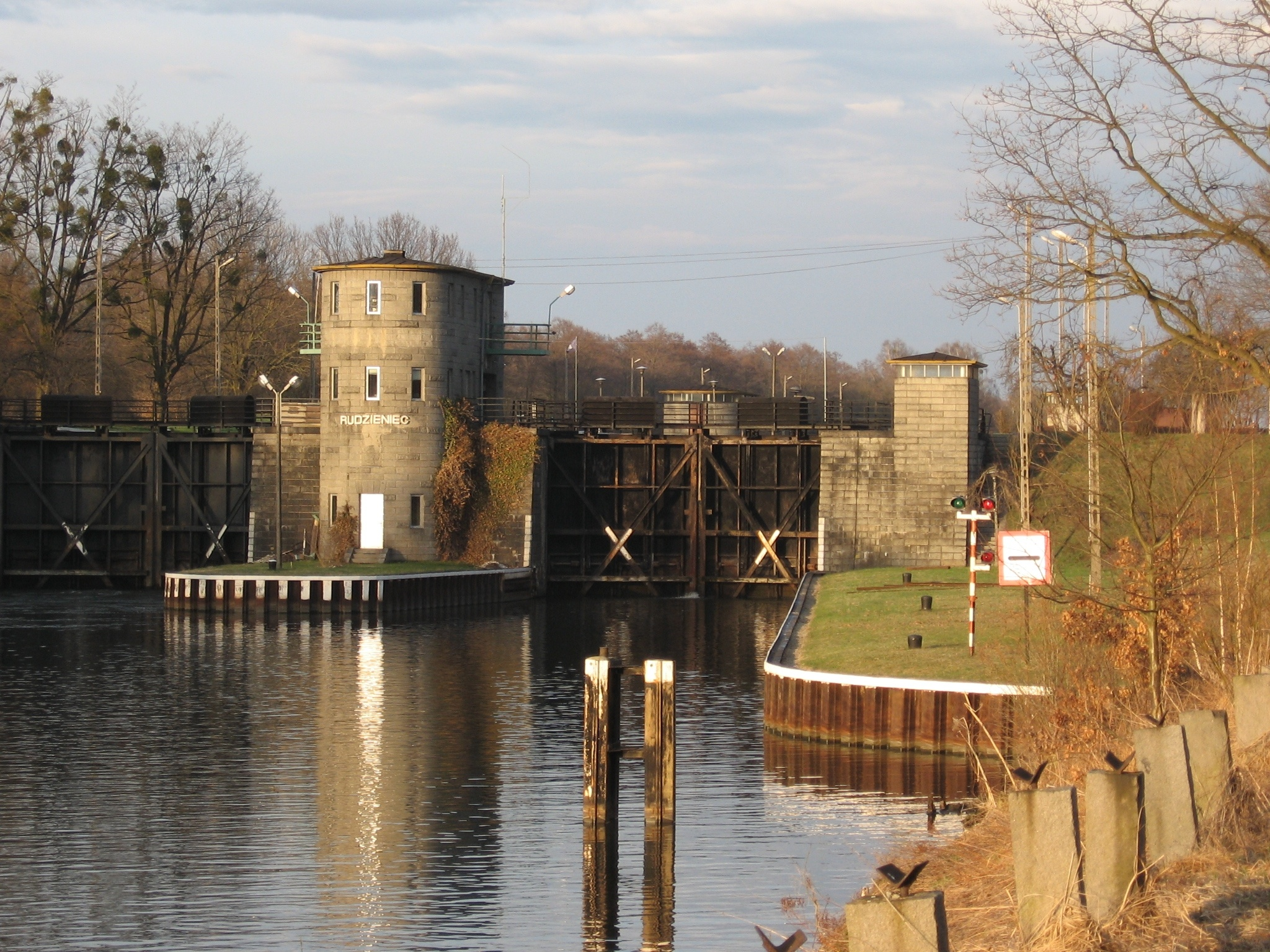 Opis: Śluza na Kanale Gliwickim w Rudzińcu Beschreibung: Schleuse auf dem Gleiwitzer Kanal in Rudziniec, Polen Description: Lock on Gliwice Channel in Rudziniec, Poland Date: 2006-04-16 Author: kirq